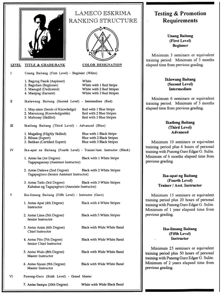 Lameco Ranking